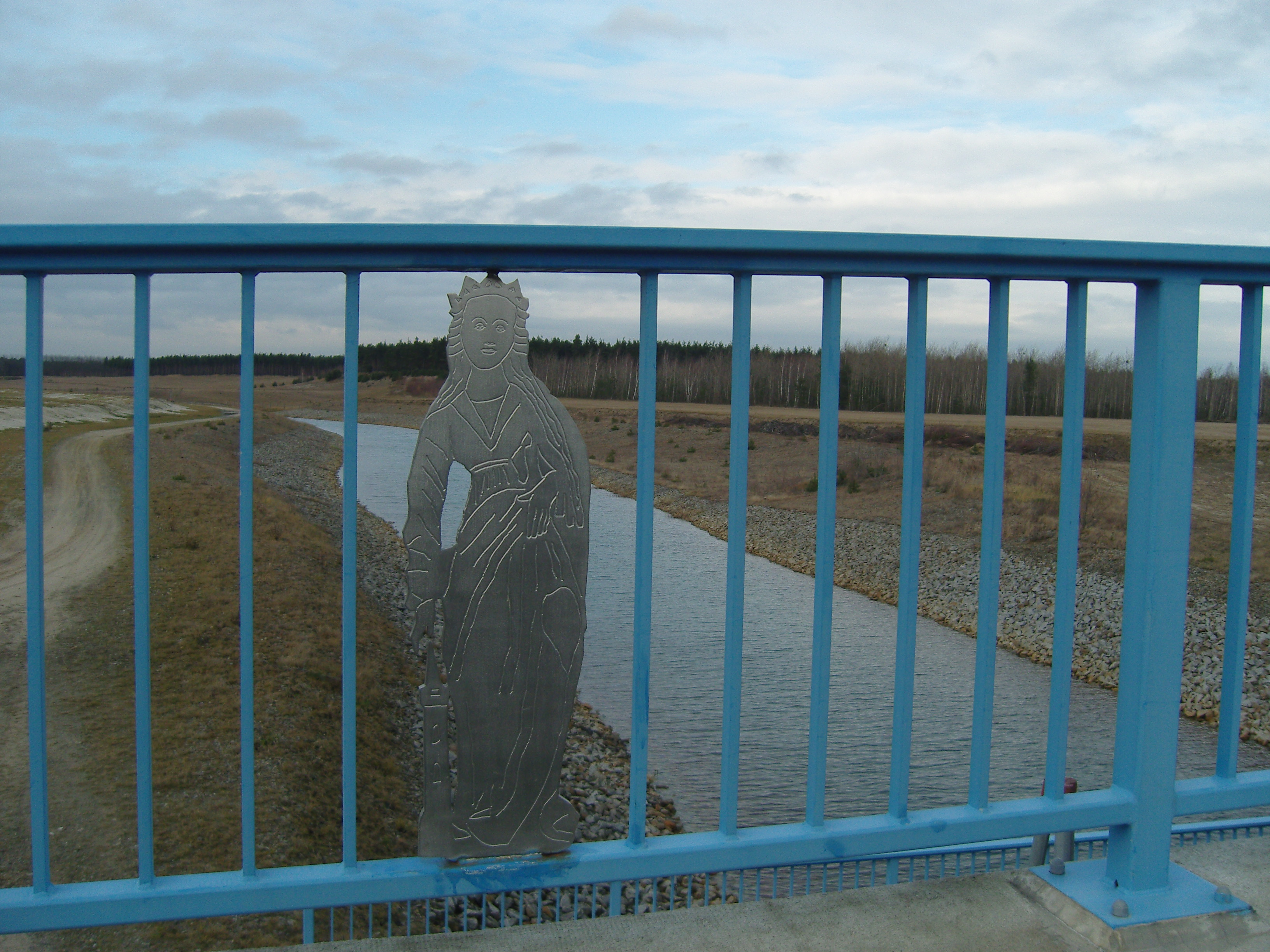 Der Barbarakanal - Verbindung vom Geierswalder zum Partwitzer See. Blickrichtung Geierswalder See, dargestellt im Brückengeländer die Heilige Barbara, als Schutzheilige der Bergleute